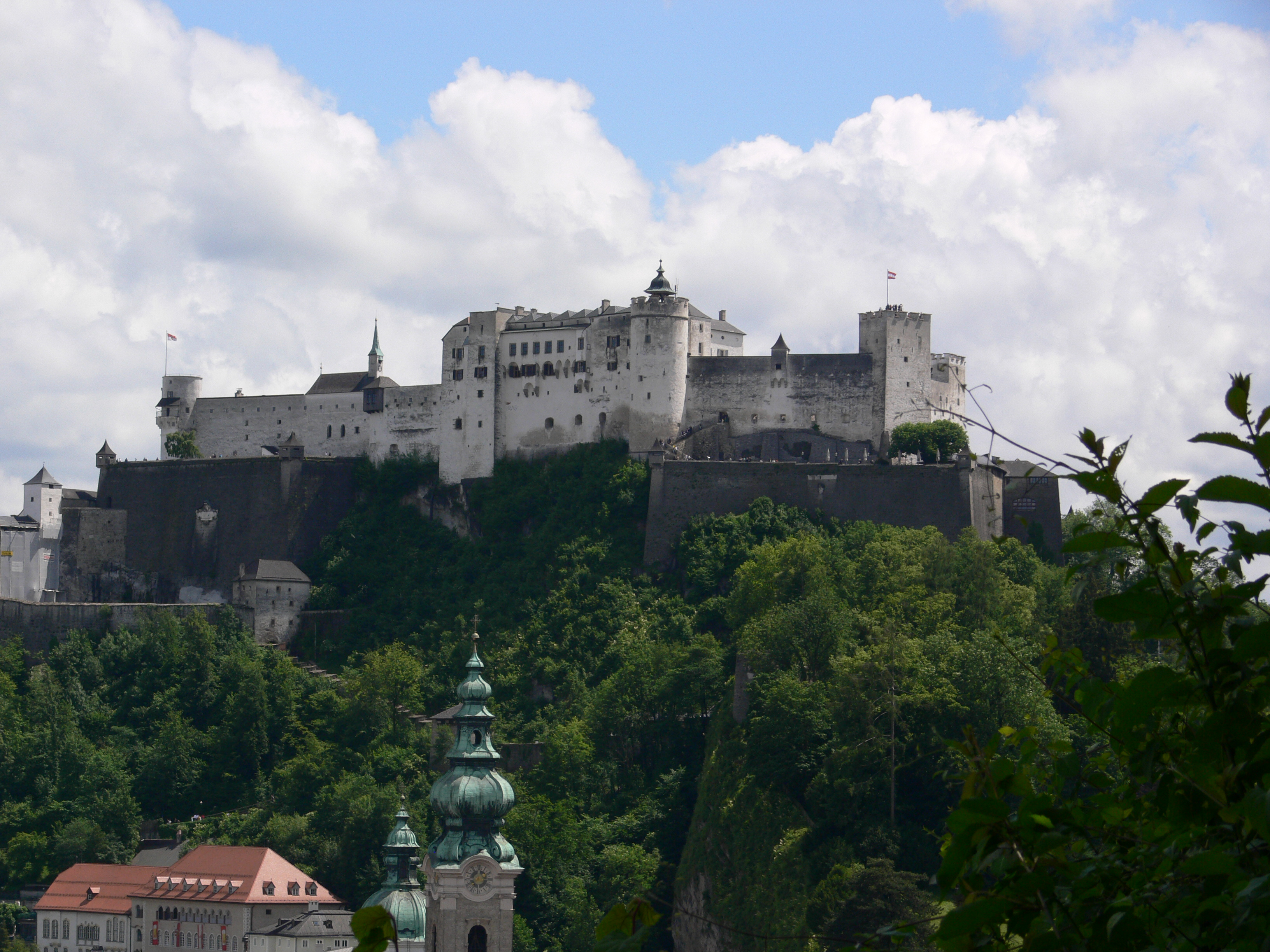 Salzburg, Festung Hohensalzburg, Aussicht vom Mönchsberg